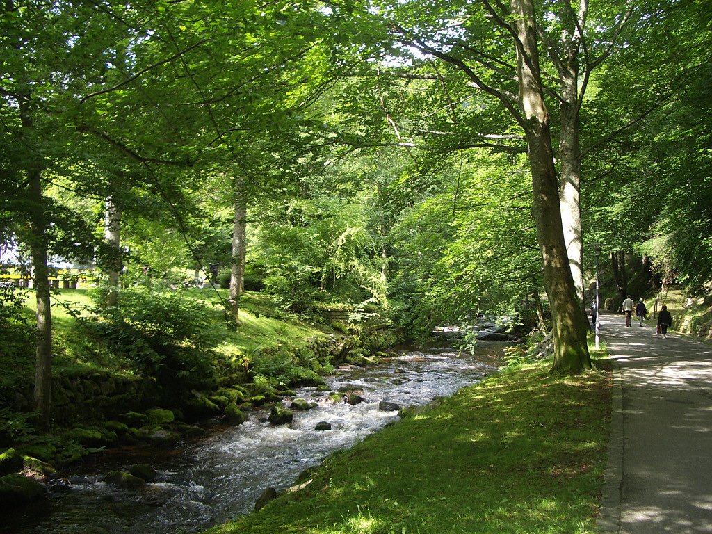 Bad Wildbad, Germany: Die Enz im Kurpark